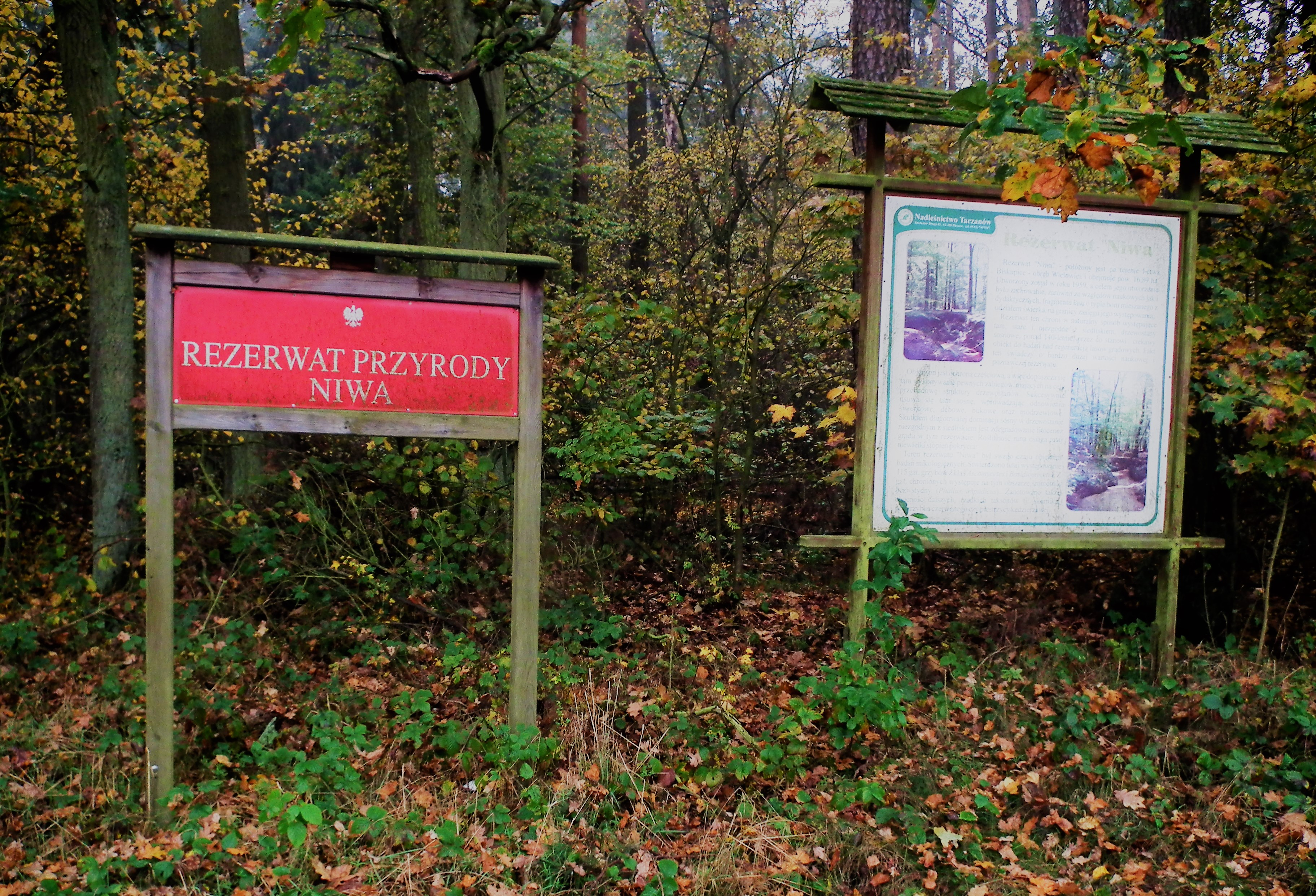 Rezerwat przyr. Niwa w gm. Sieroszewice.